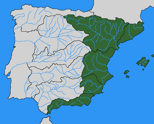 Hidrografía. Vertiente mediterranea. Cuencas hidrográficas. Ríos. hidrografia de España. rios de España. hidrograficas. Mar Mediterraneo. mediterranean sea. spanish rivers. Spain´s hidrografy.